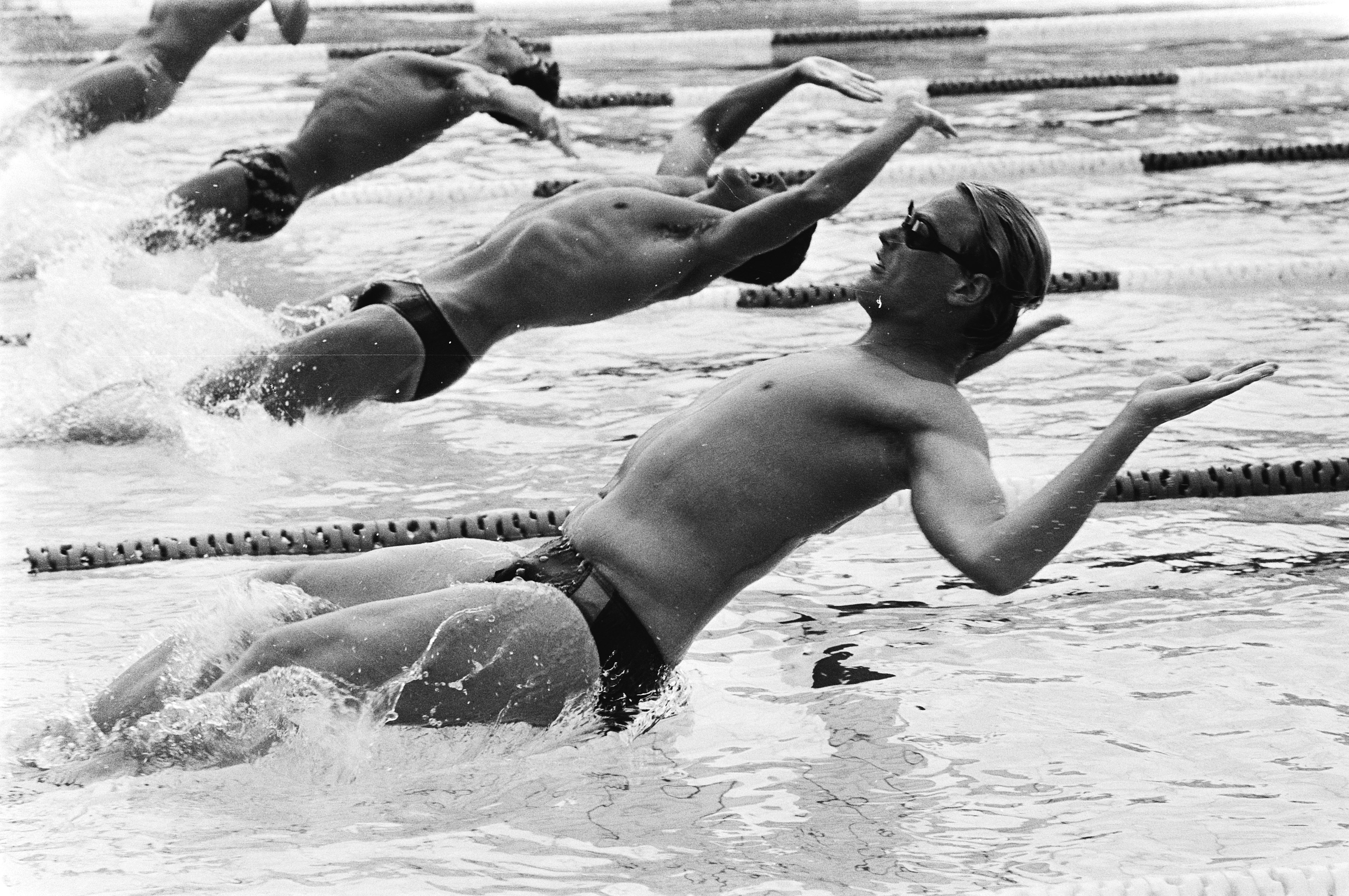 Collectie / Archief : Fotocollectie Anefo Reportage / Serie : Europa Cup Zwemmen Dames A en Heren B 1979 in Utrecht Beschrijving : Fred Eefting bij de start 100 meter rugslag Annotatie : Randnummers negatiefstrook: nr. 15 : portret Datum : 11 augustus 1979 Locatie : Utrecht (prov), Utrecht(stad) Trefwoorden : sport, zwemmen Persoonsnaam : Eefting, Fred Instellingsnaam : Europa Cup Fotograaf : Bogaerts, Rob / Anefo Auteursrechthebbende : Nationaal Archief Materiaalsoort : Negatief (zwart/wit) Nummer archiefinventaris : bekijk toegang 2.24.01.05 Bestanddeelnummer : 930-3937